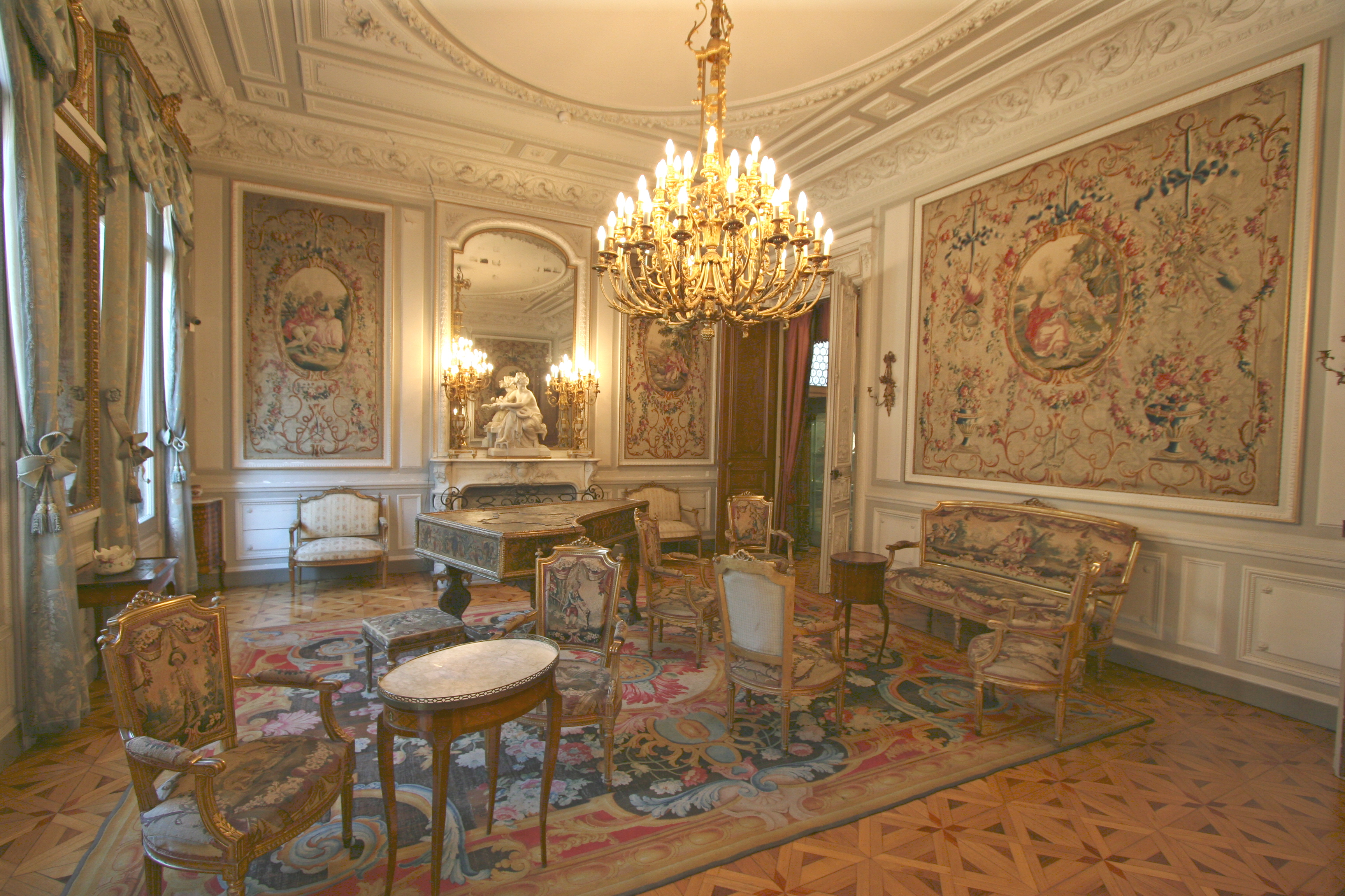 Salon de musique au musée Grobet-Labadié à Marseille.